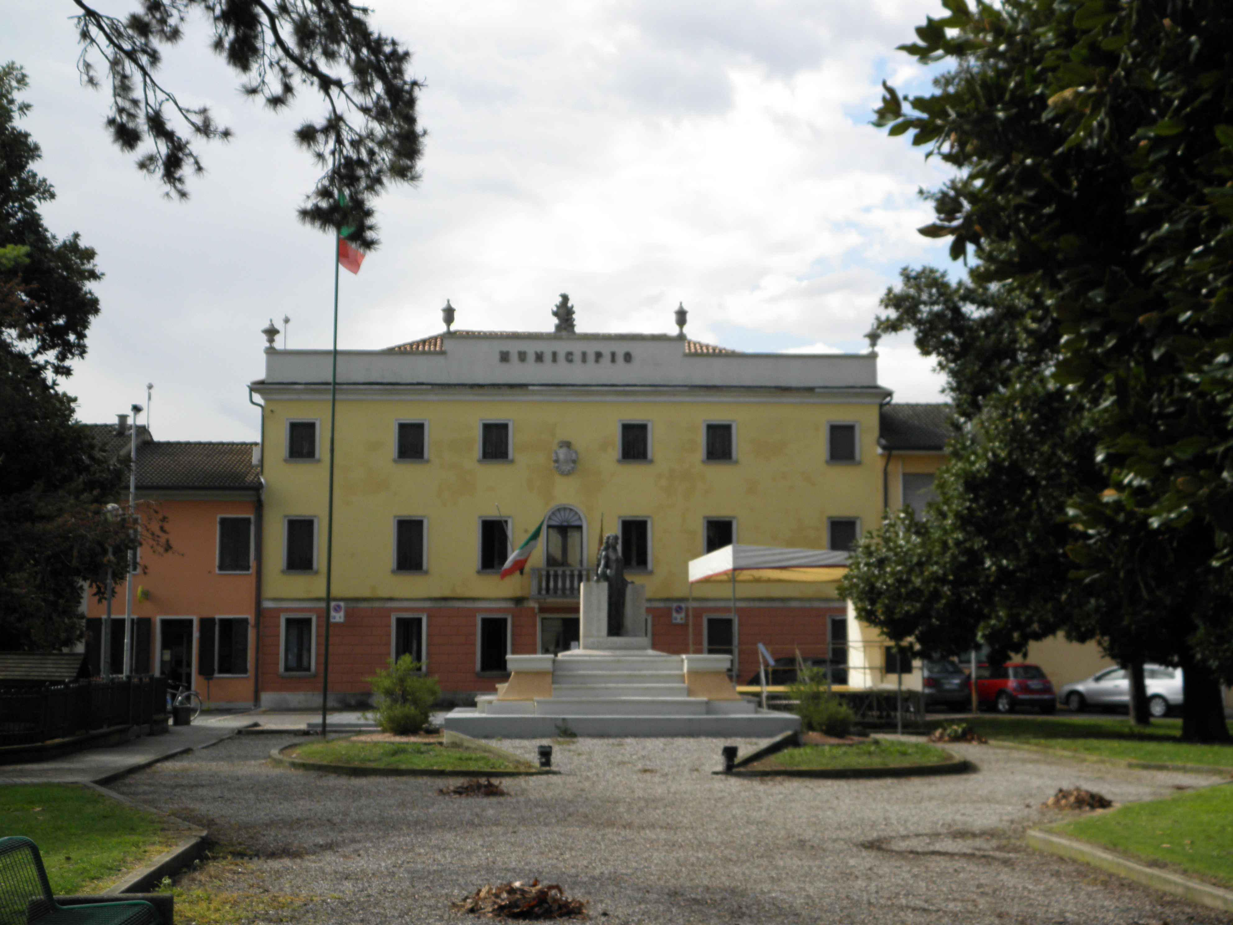 Terrazzo: il piazzale antistante a Villa Adele-Brizzi, sede municipale, con il monumento ai caduti.